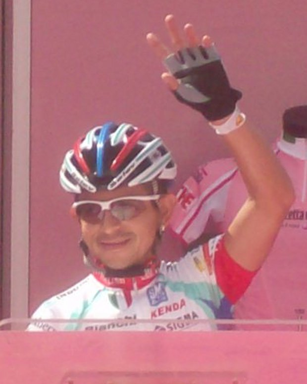 foto in primo piano